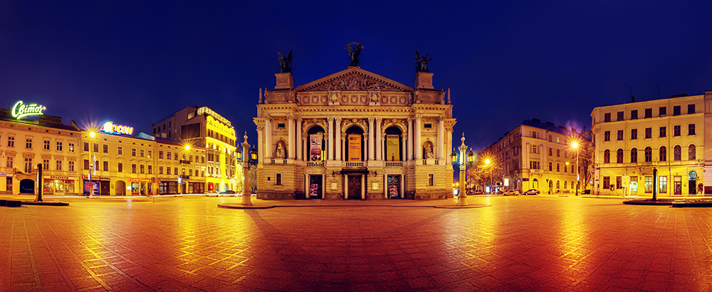 Театр опери та балету, в якому виступали видатні співаки, артисти, композитори світової слави, Львів, Свободи пр., 28